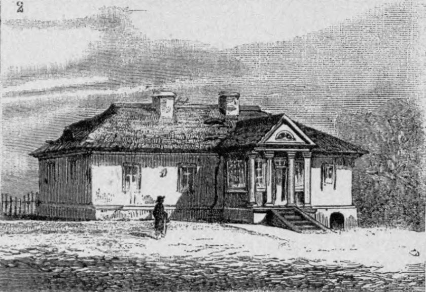 Беларуская (тарашкевіца): Наваградак (Navahradak), дом Адама Міцкевіча (Adam Mickievič)